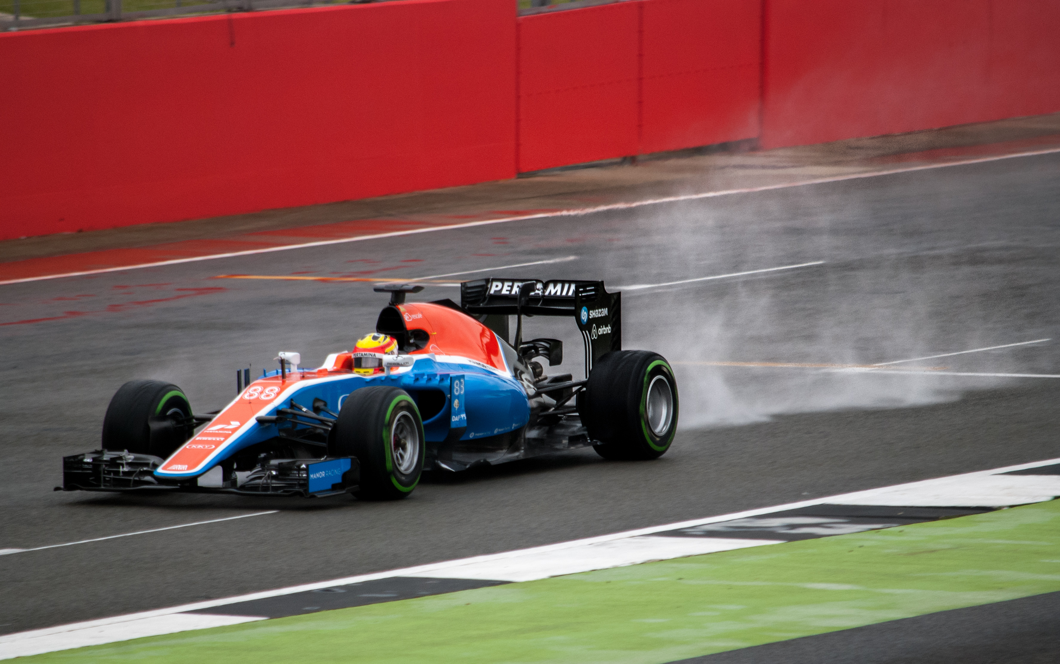 Rio Haryanto - Manor